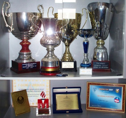 аллея славы азербайджанского волейбола